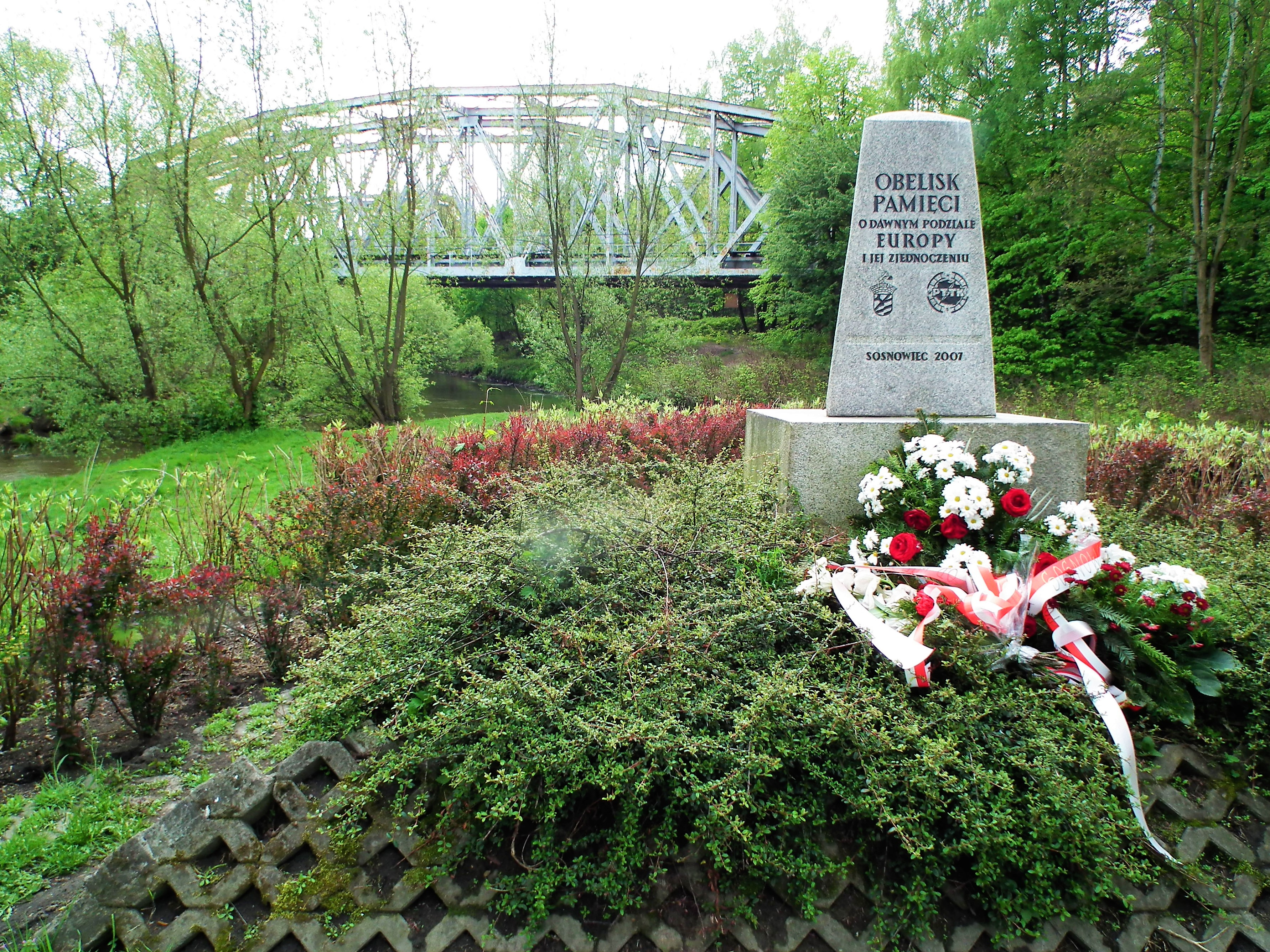 Trójkąt trzech cesarzy od strony Sosnowca.